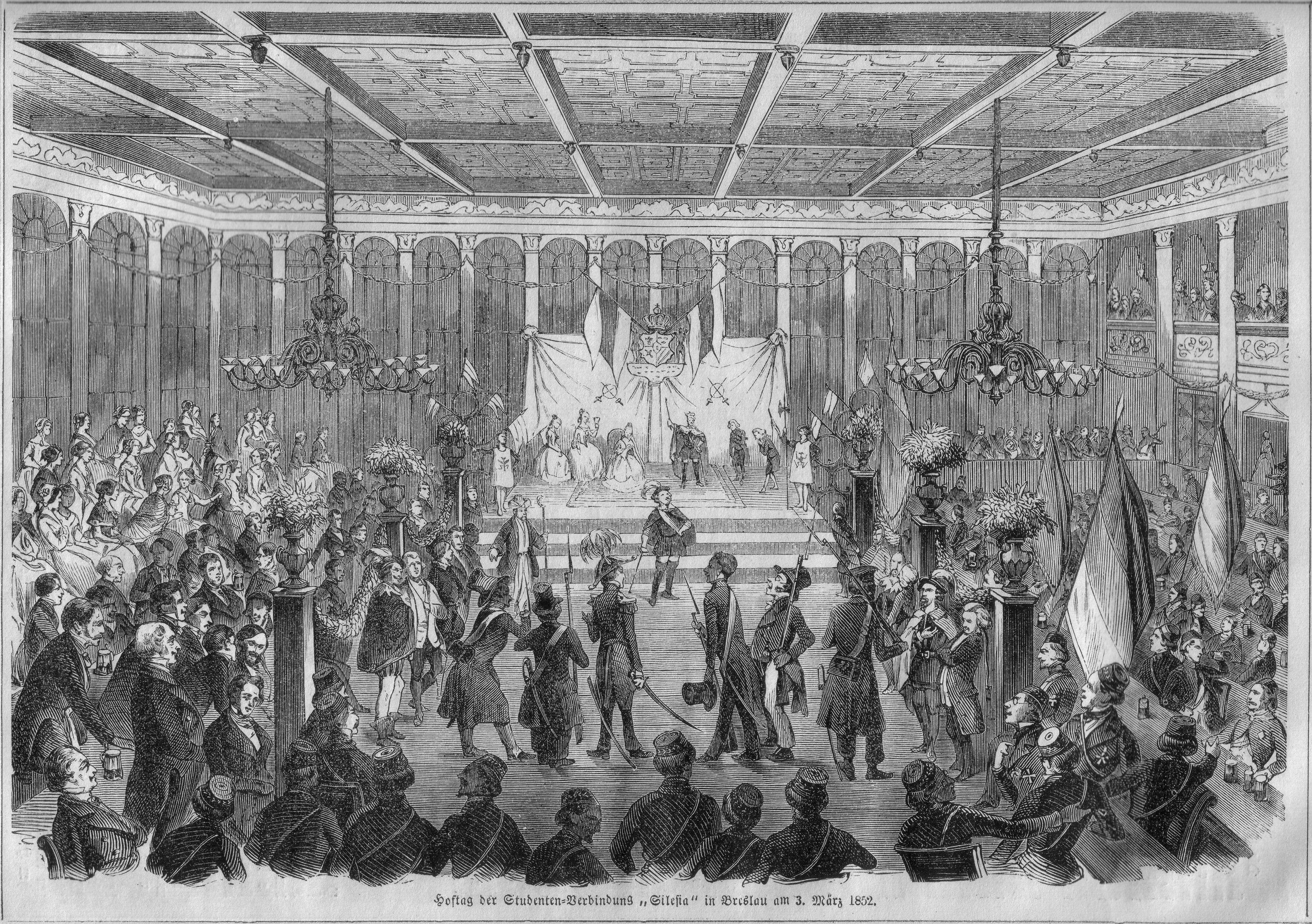 Hoftag der Studentenverbindung "Corps Silesia" in Breslau am 3. März 1852